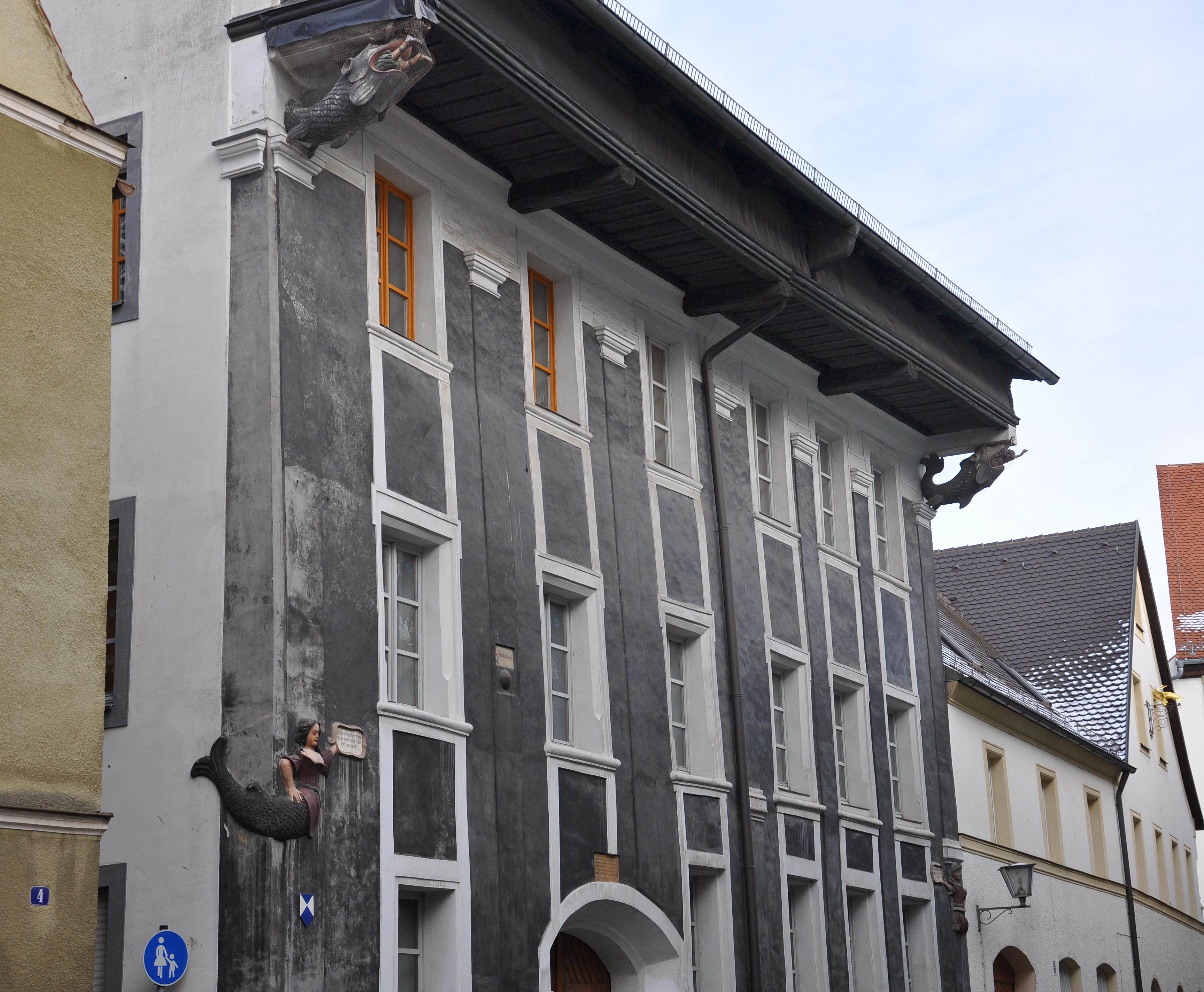 Amberg, "Walfischhaus". Die Bezeichnung bezieht sich auf die Bibelgeschichte mit Jones, die anhand zweier Figuren unterhalb des Giebels veranschaulicht wird.This is a photograph of an architectural monument.